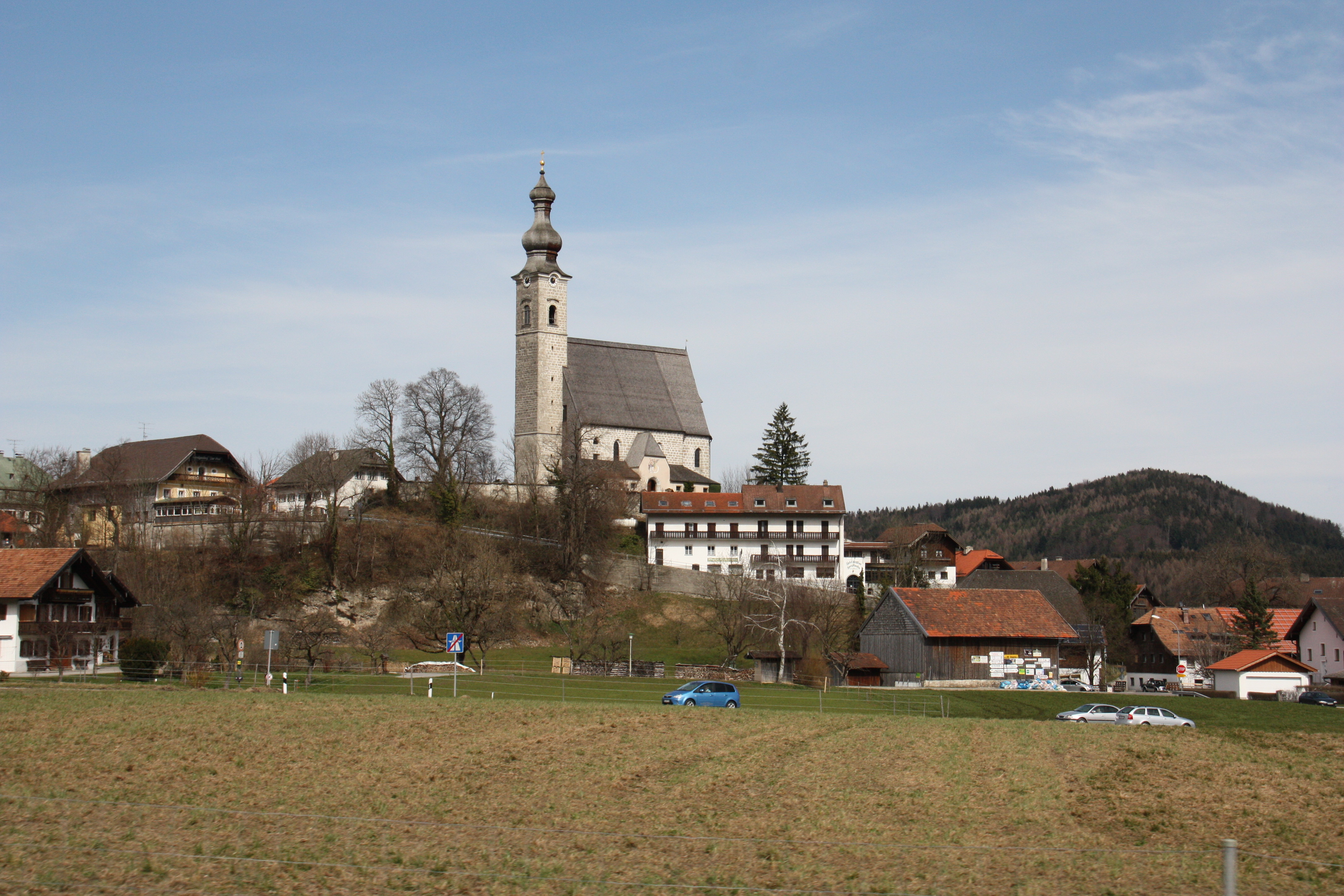 Die Gemeinde Anger im Berchtesgadener Land mit ihrer charakteristischen Kirche, von der Autobahn A8 aus gesehen.